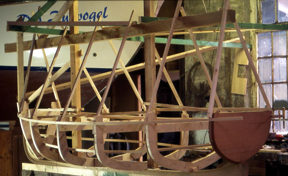 3m Klinker Dinghi im Bau